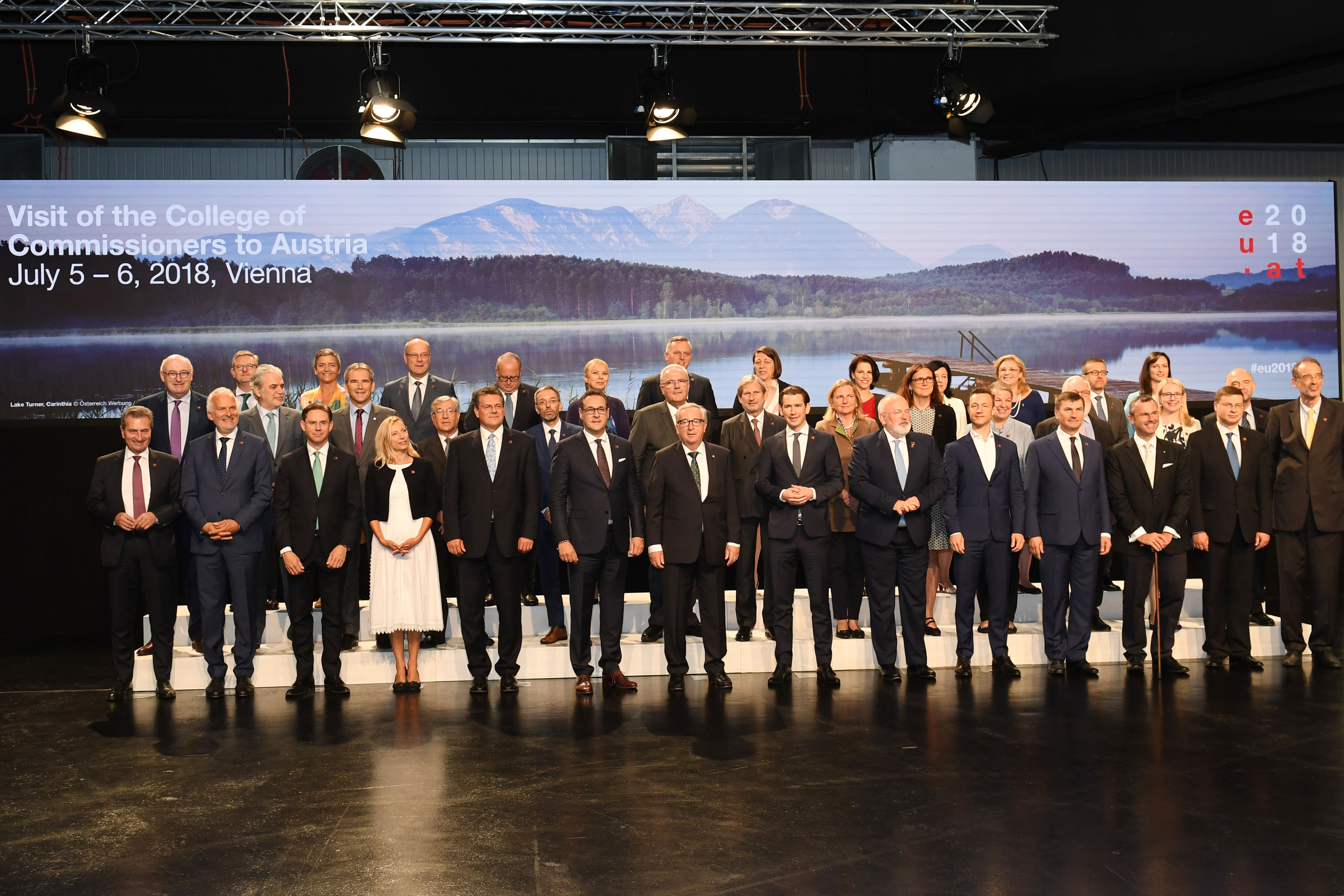 Wien 6. Juli 2018, Heute traf die Bundesregierung das Kollegium der Europäischen Kommission anlässlich des Beginns des österreichischen Ratsvorsitzes eu2018at. Für Außenministerin Karin Kneissl stand u.a. die Arbeitsgruppe zu Sicherheit, Verteidigung, Außengrenzschutz, Migration und Südosteuropa auf dem Programm. Foto : Mahmoud